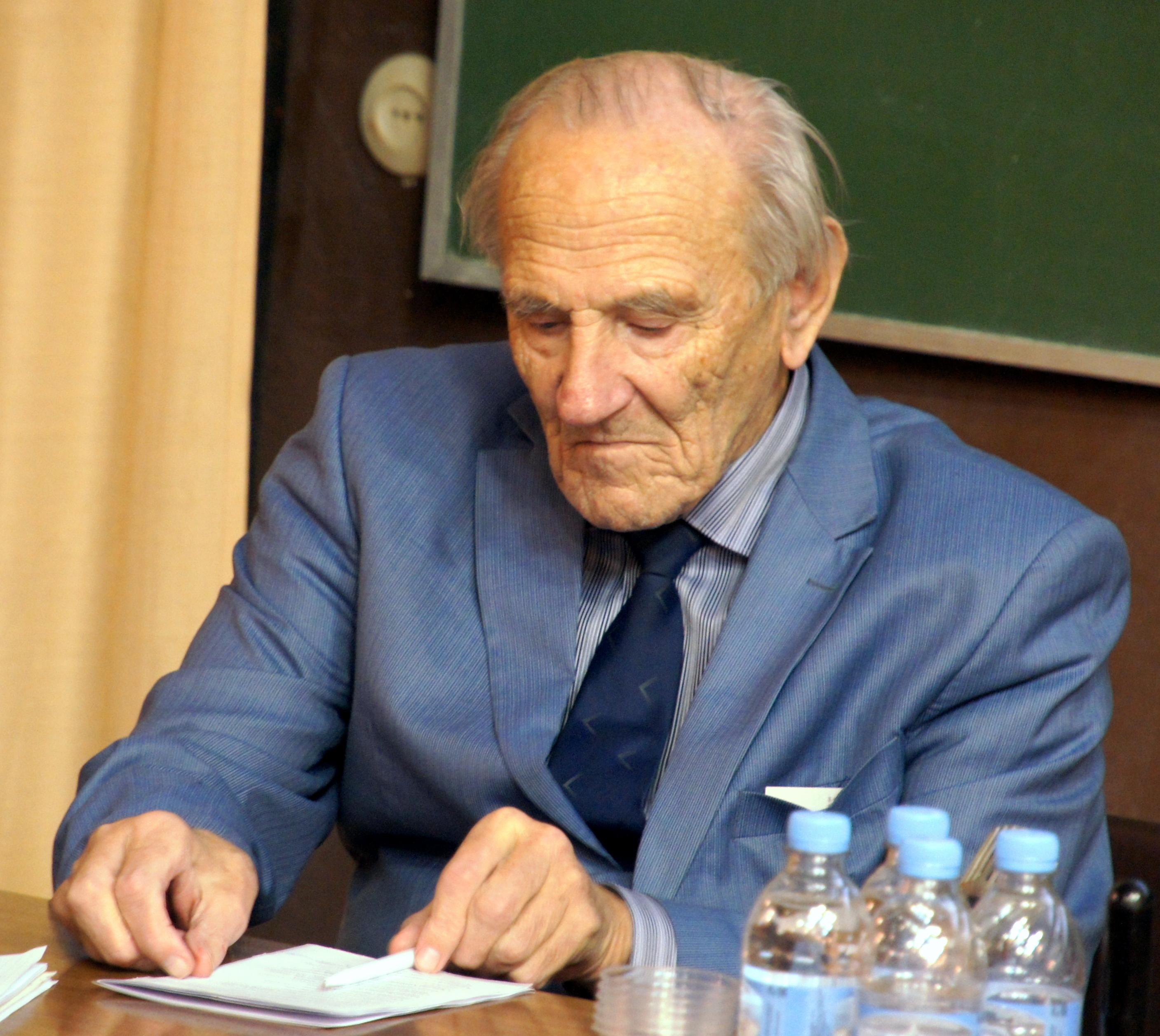 Игорь Васильевич Иванов, профессор, почвовед, историк науки.